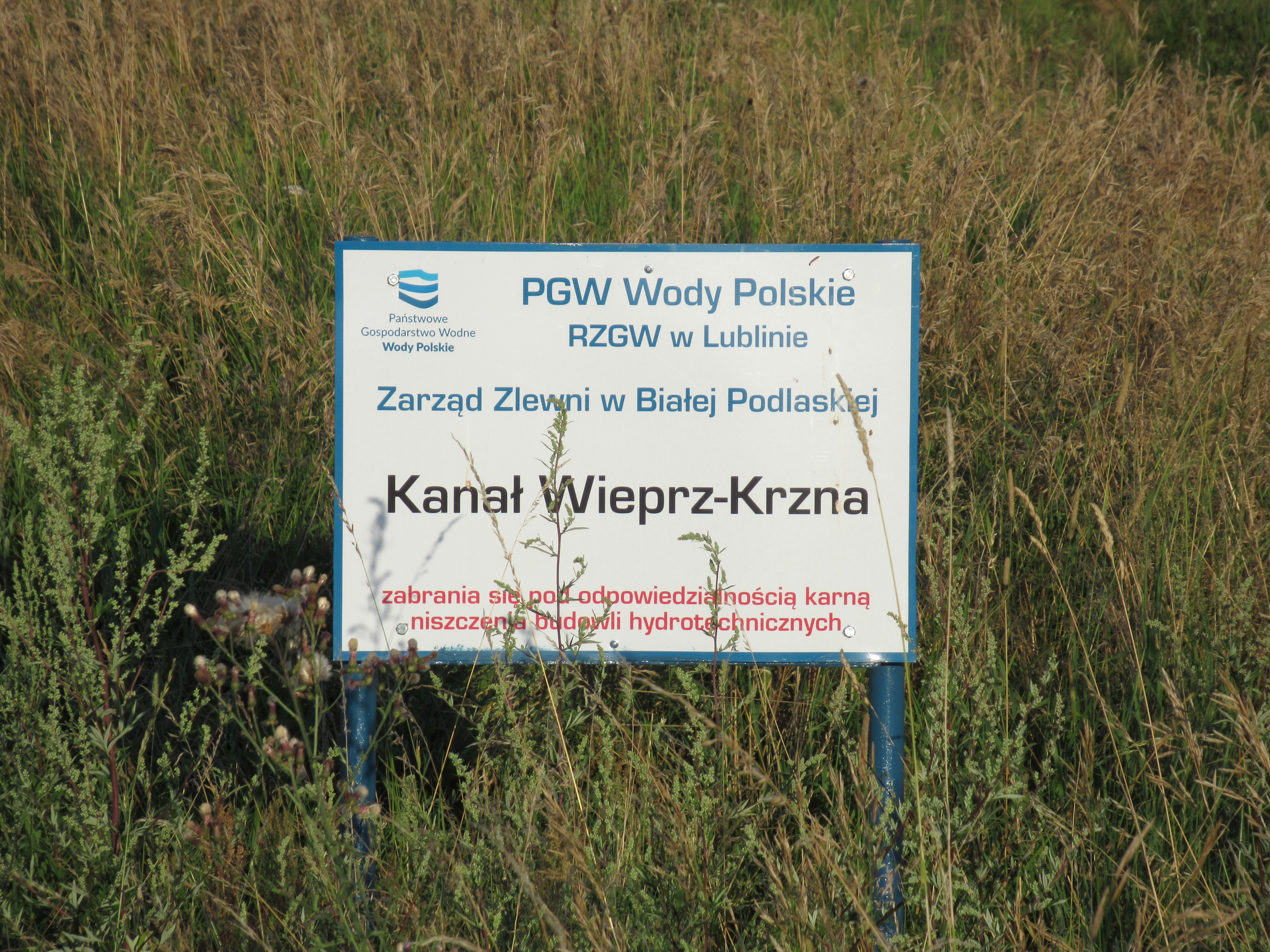 Łózki (pow. bialski, woj. lubelskie, Polska). Kanał Wieprz – Krzna. Tabliczka przy kanale.